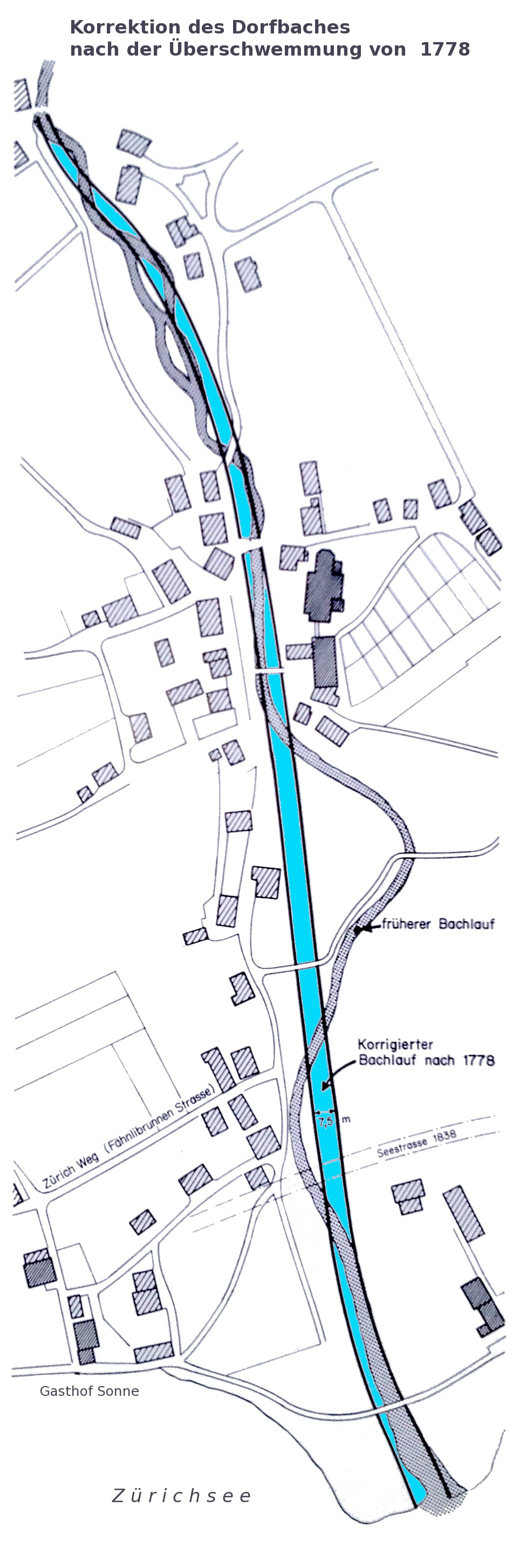 Korrektion des Küsnachter Dorfbaches nach der Überschwemmung 1778